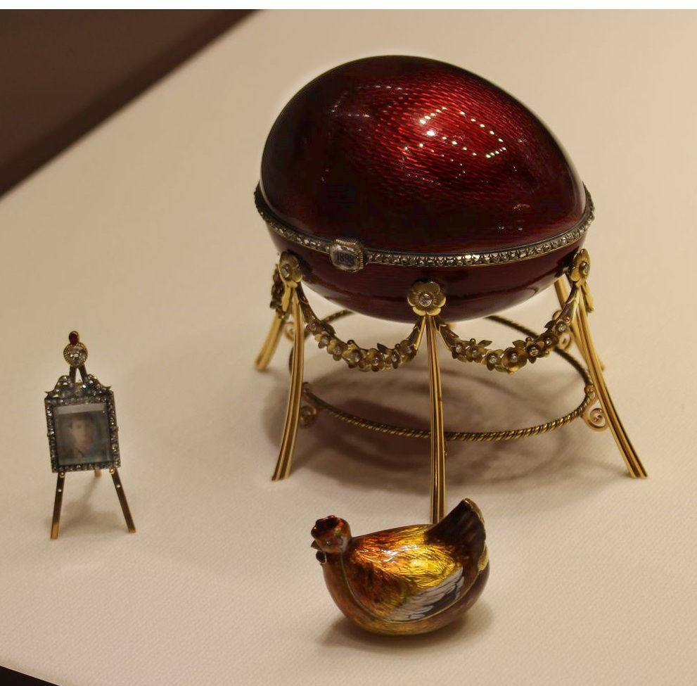 L'Uovo con gallina per Kelch è un uovo di Pasqua gioiello che fu fabbricato a San Pietroburgo tra il 1899 e il 1903 sotto la supervisione di Michael Perkhin, per conto del gioielliere russo Peter Carl Fabergé al quale era stato ordinato da Alexander Kelch che ne fece dono a sua moglie, l'ereditiera Varvara Petrovna Bazanova